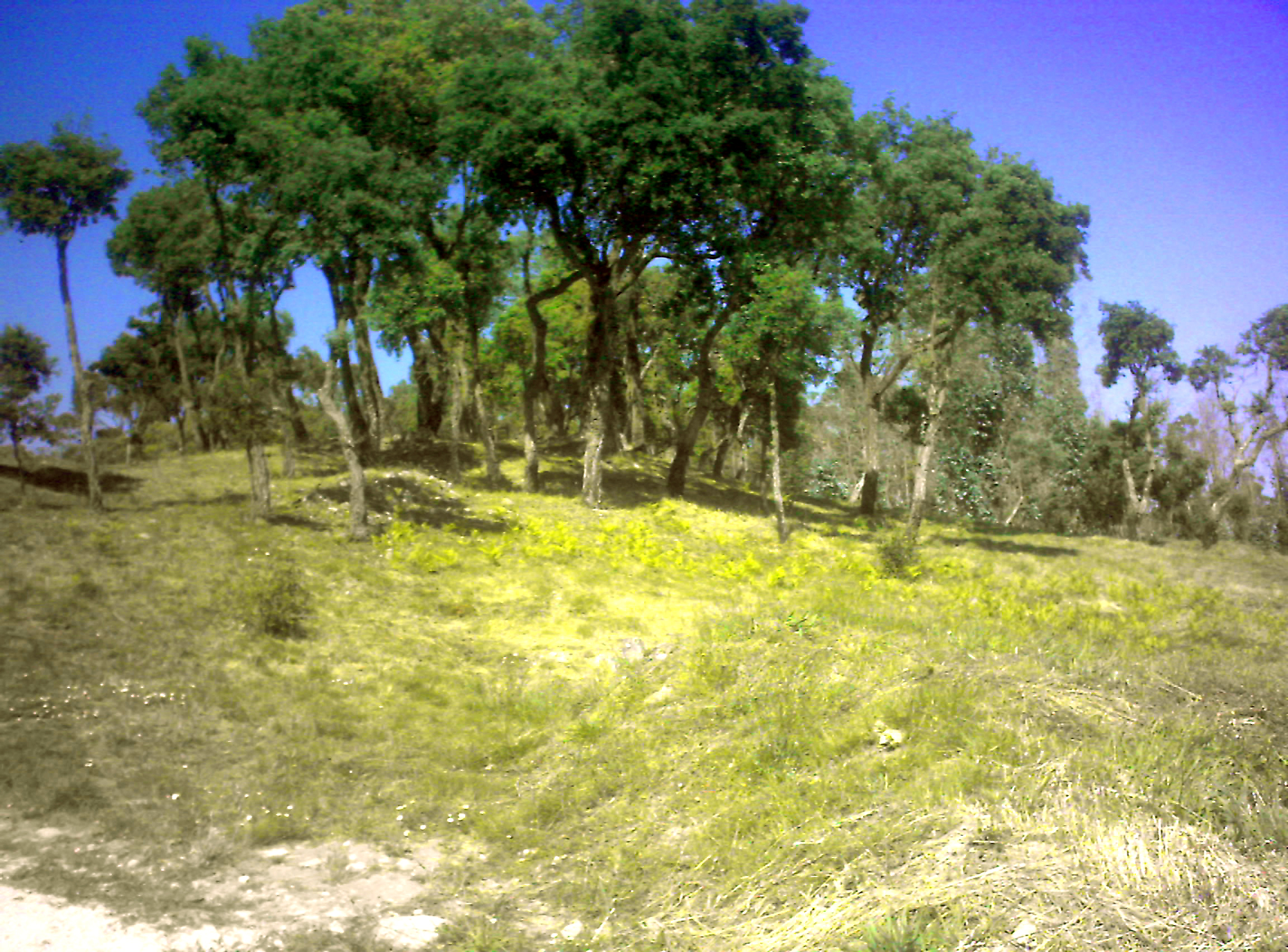 Flora autóctone junto à Cividade de Terroso